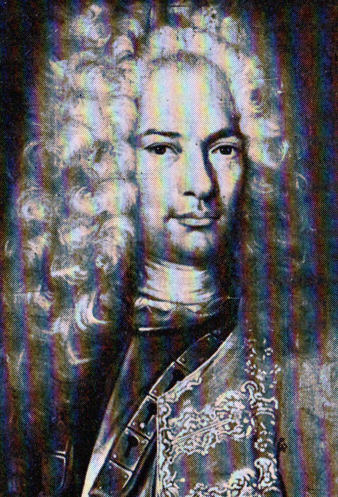 Fältmarskalk Göran Silfverhielm